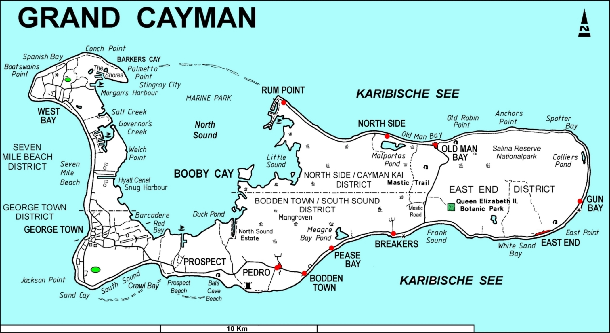 Karte der Insel Grand Cayman